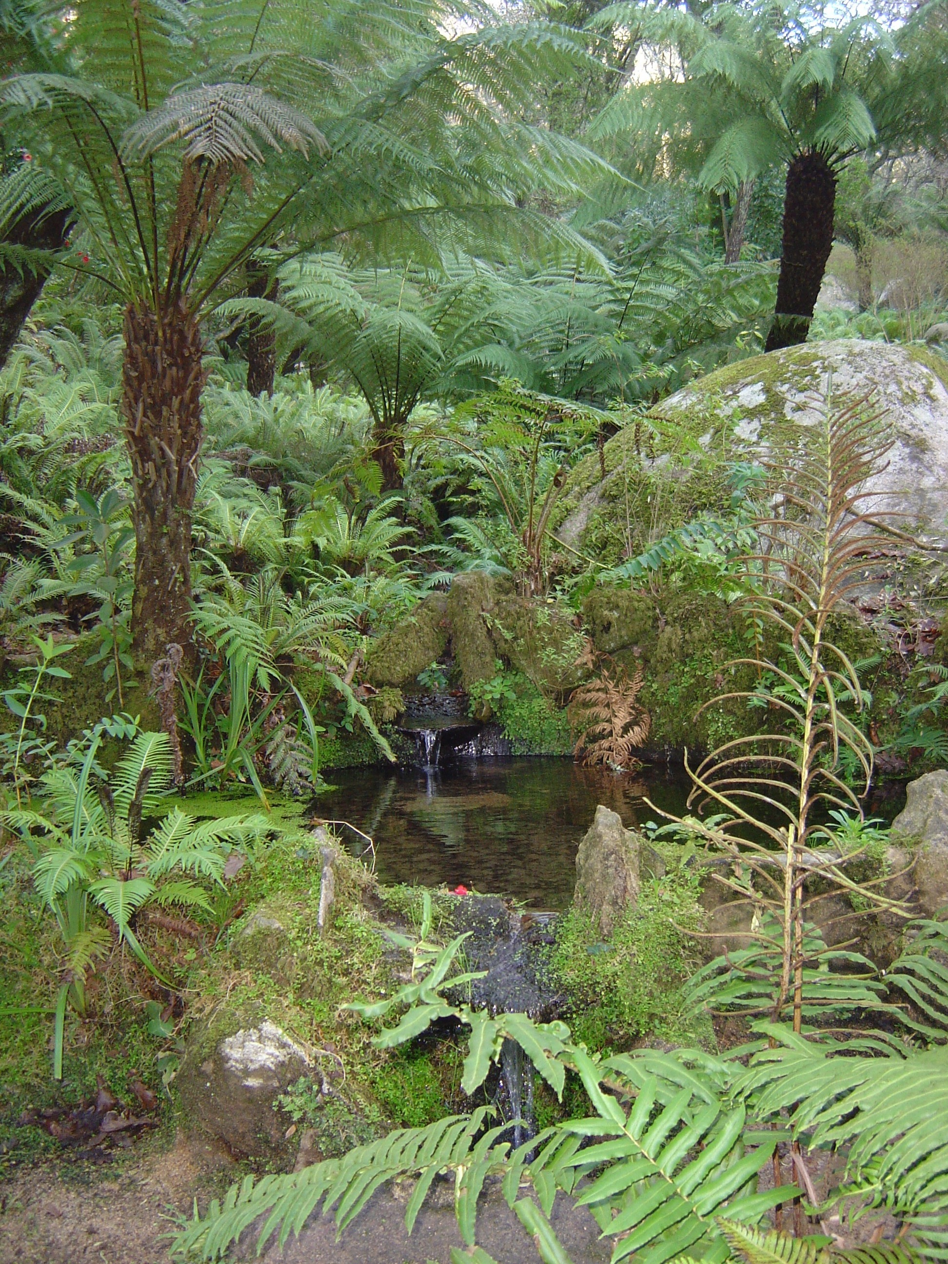 Fern Garden, Pena Palace, Sintra, Portugal